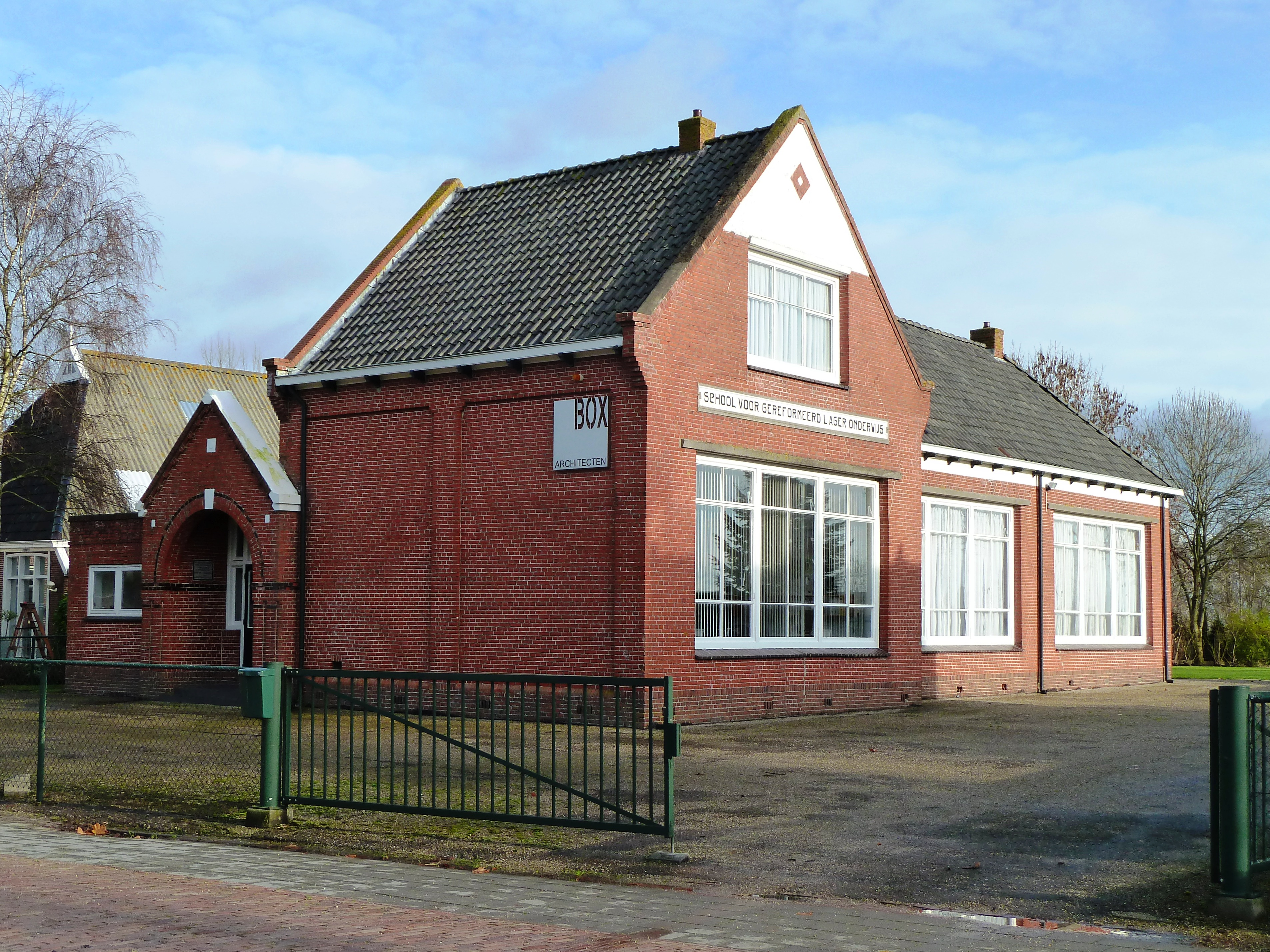 Voormalige gereformeerde lagere school met den bijbel in Burum. De school werd opgericht in 1921 en gesloten in ???? (in 1981 was de school nog in bedrijf). Tegenwoordig (2010) is er een architectenbureau gevestigd.